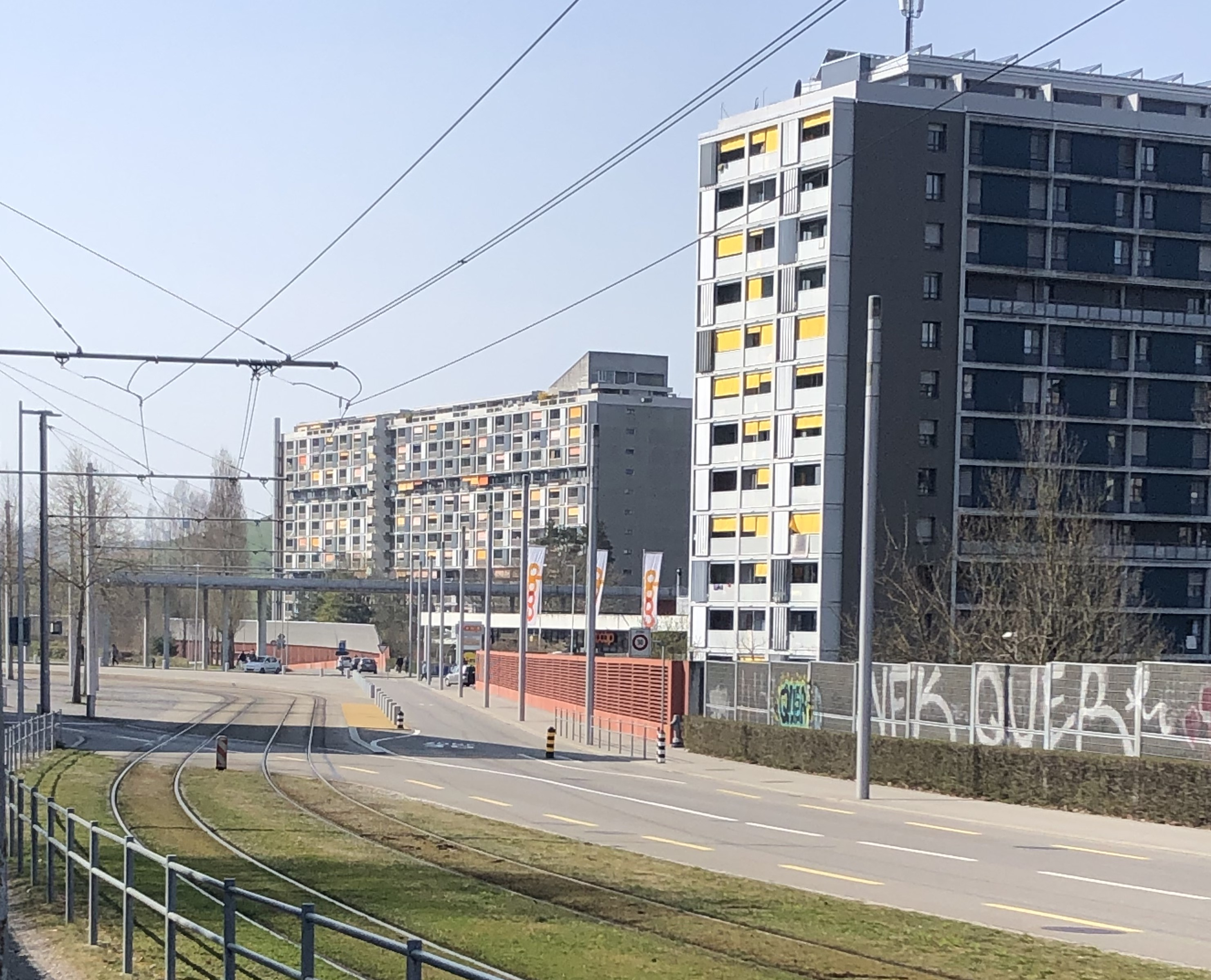 Gäbelbach Hochhausblick von der Murtenstrasse